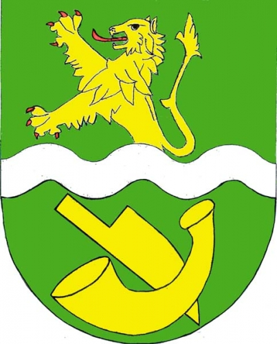 znak, Loukovice, okres Třebíč